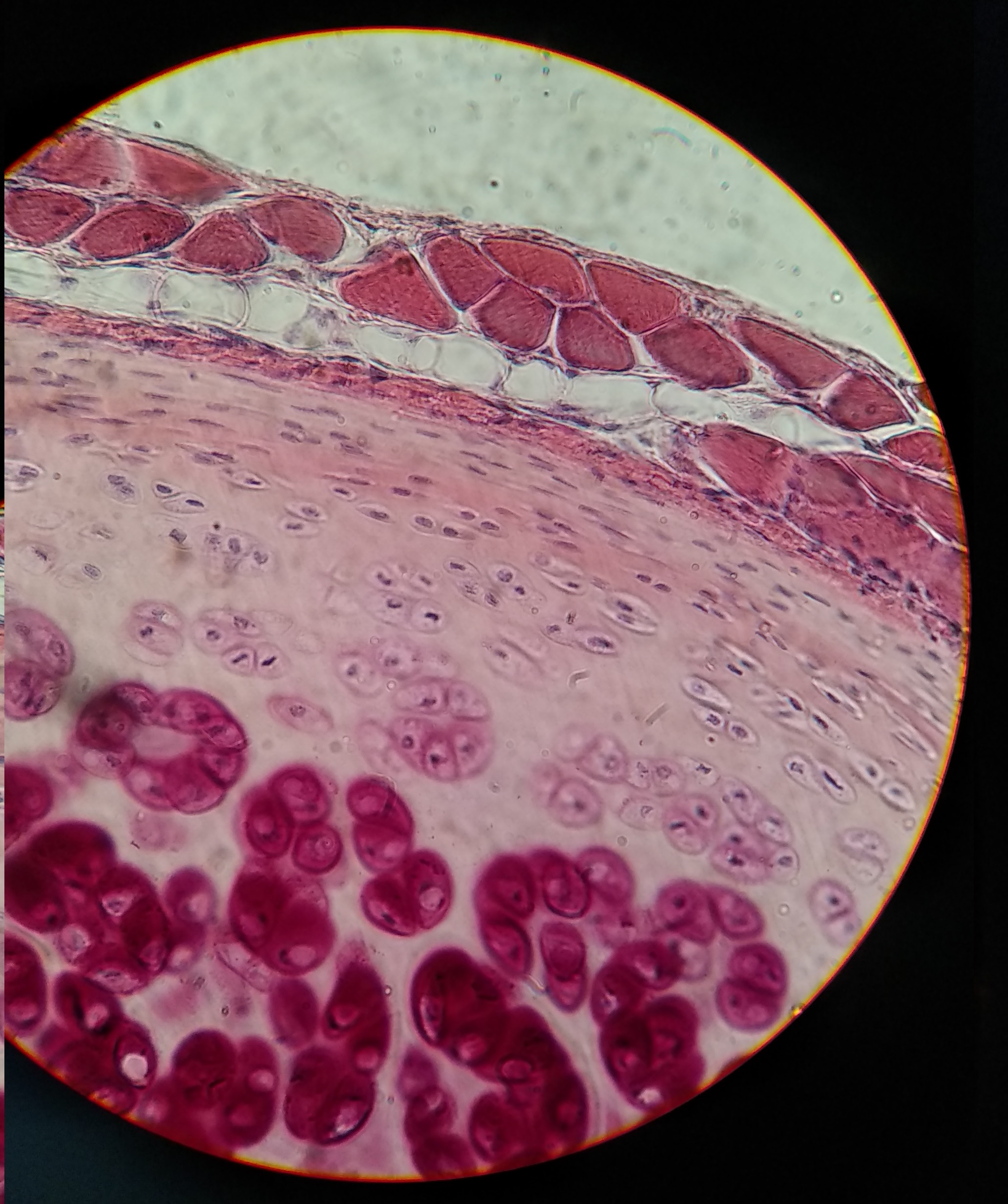 Гіаліновий хрящ ребра кролика (гематоксилін, еозин, світлова мікроскопія)